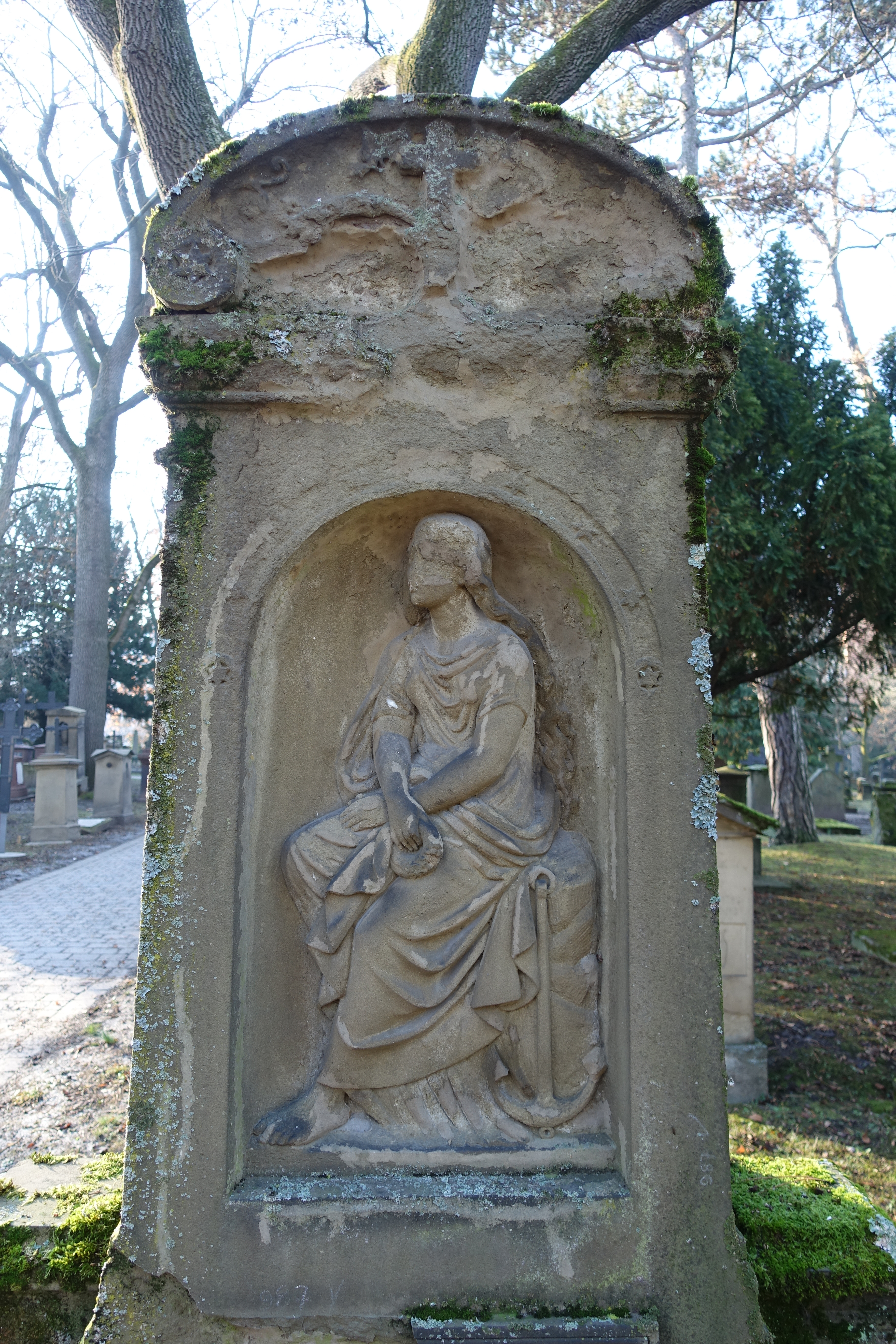 Grab von Georg Cappeller, Stuttgart, Hoppenlaufriedhof, Abteilung 5b.